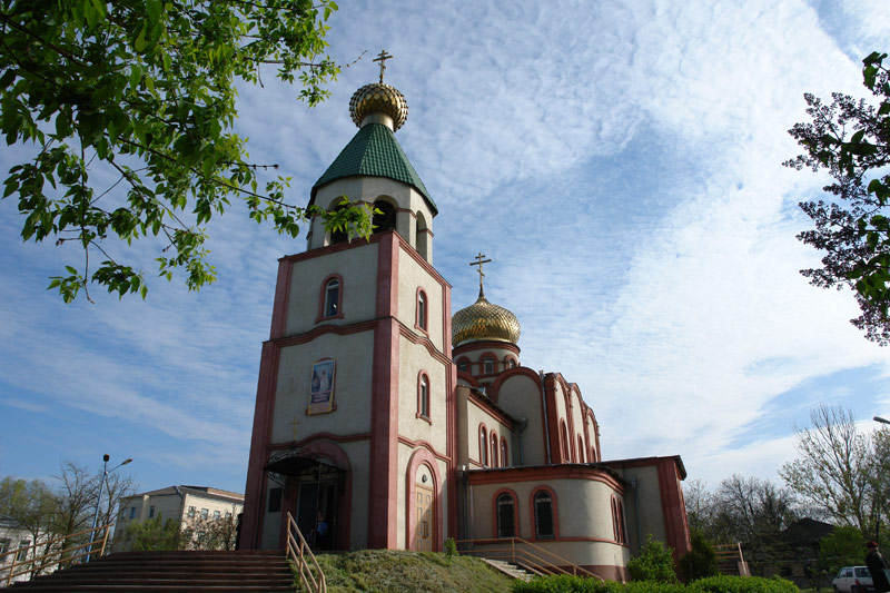 храм в Г.Кизляре